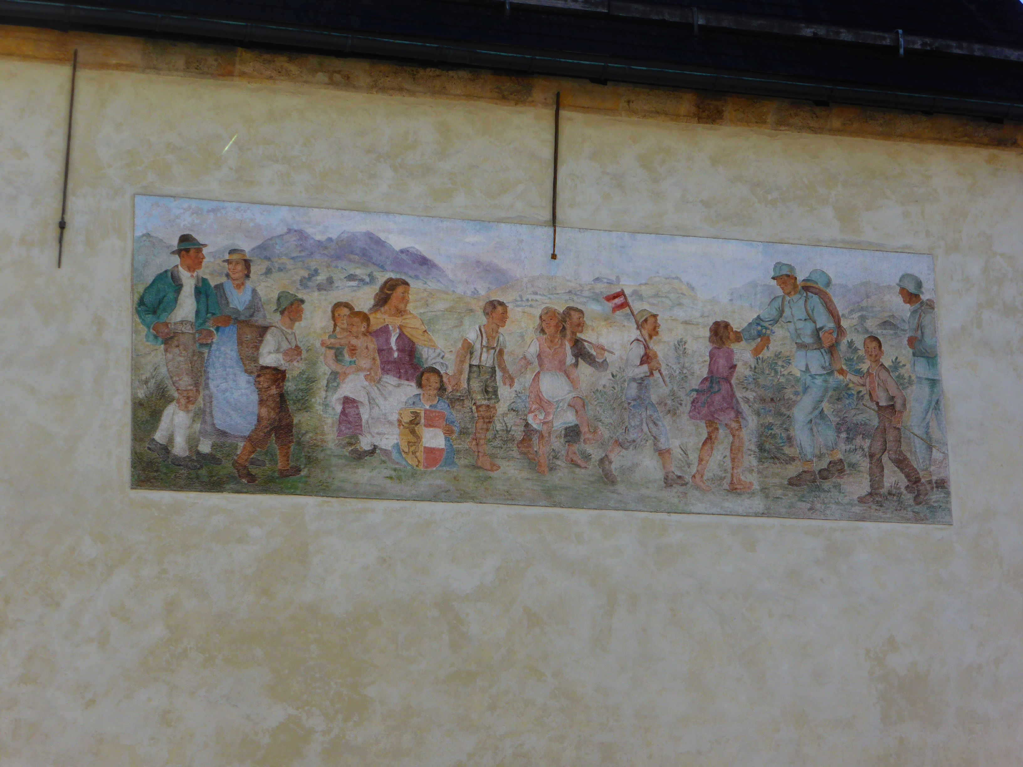 Ev. Pfarrkirche, Karner, Annakapelle